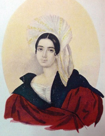 Анна Давыдовна Баратынская. ур. Абамелек (3.04.1814 - 13.02.1889).